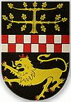 Wappen der Ortsgemeinde Reich